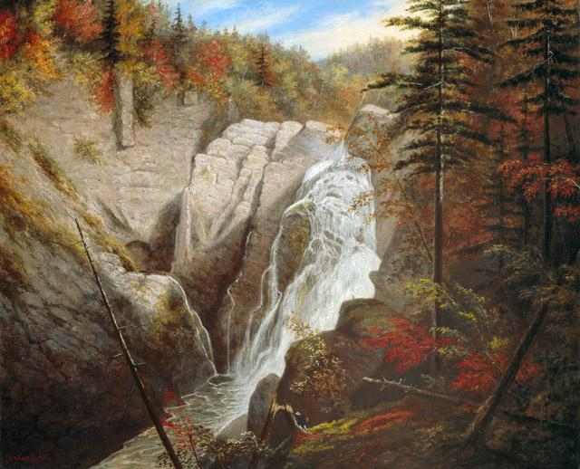 Chutes Sainte-Annelabel QS:Len,"Chutes Sainte-Anne"